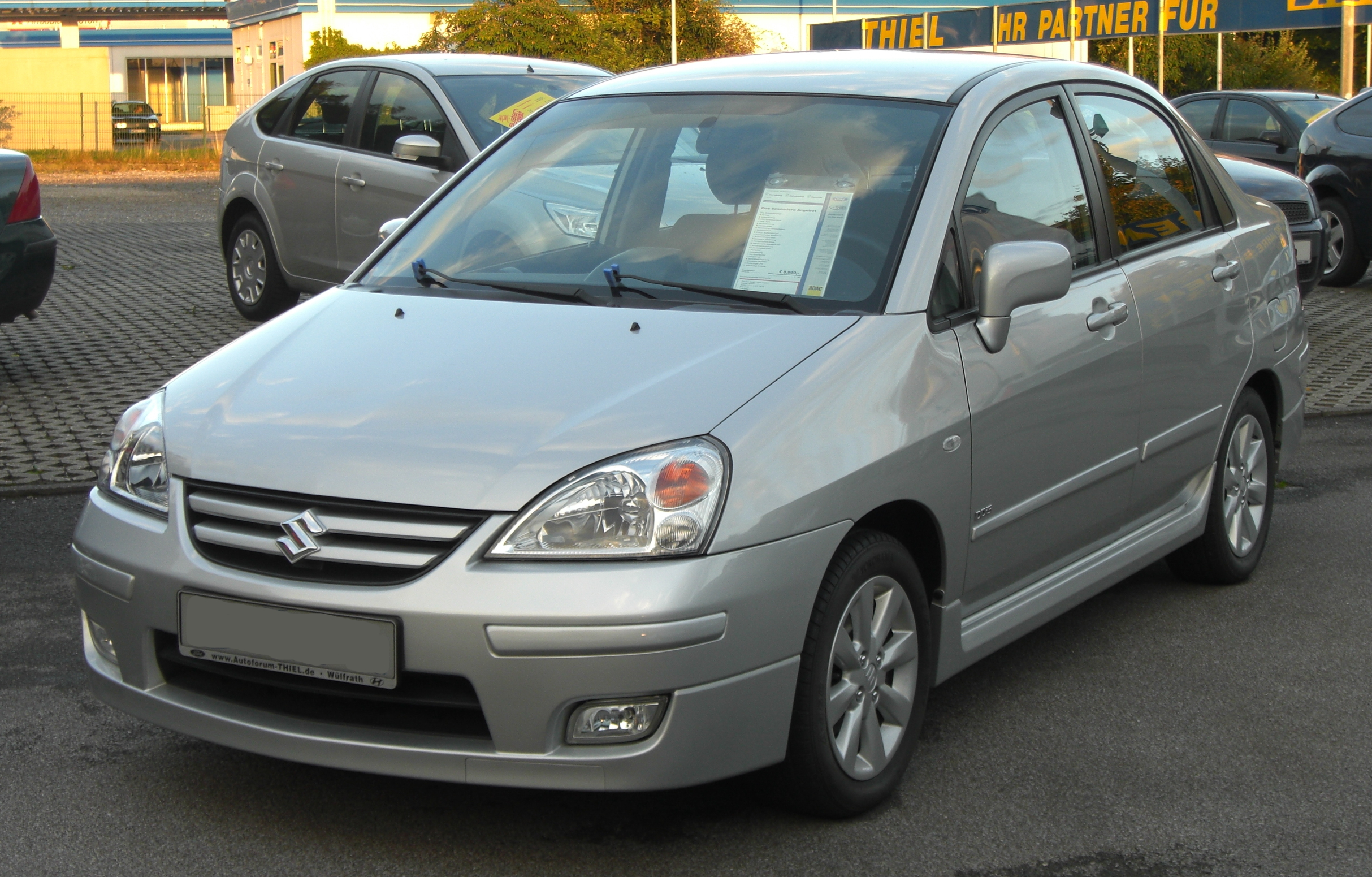 Suzuki Liana Facelift